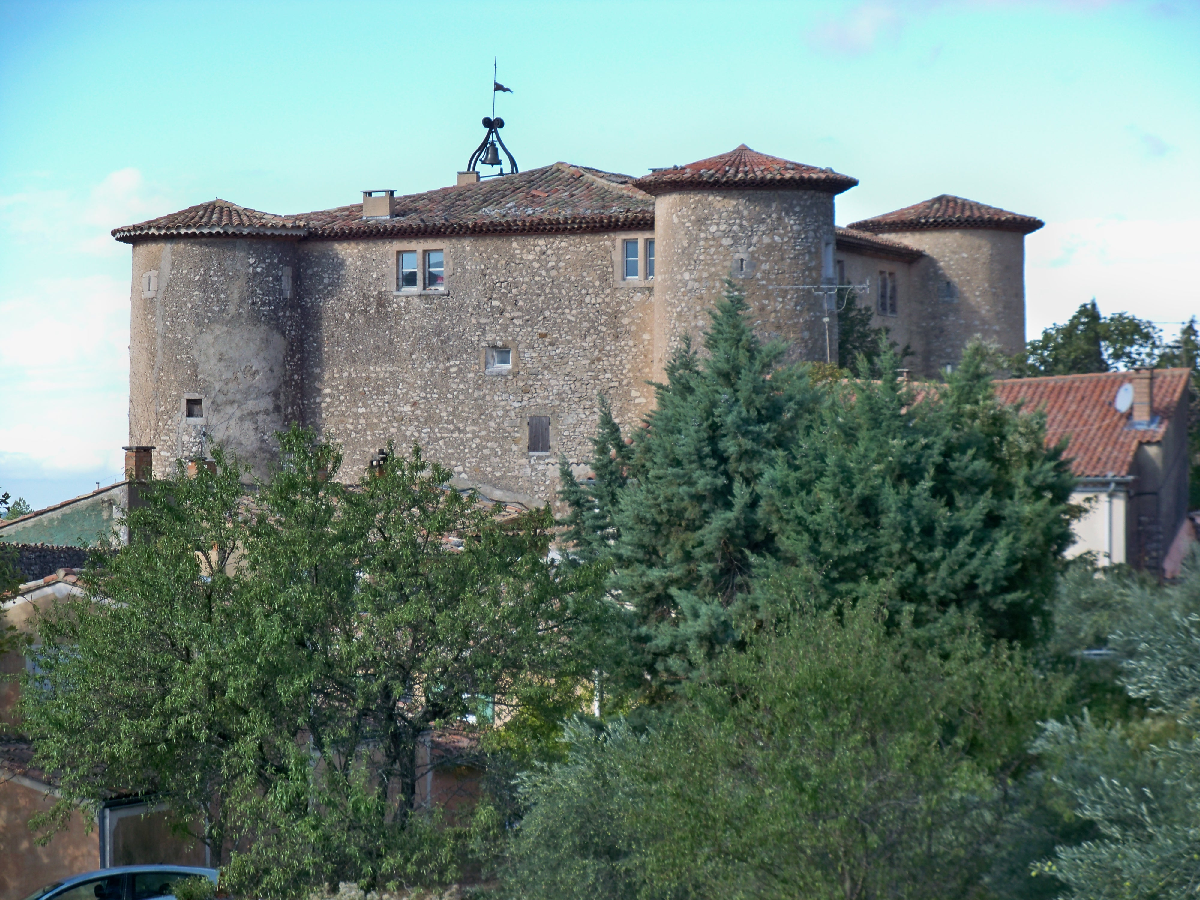 Chateau de Rustrel, Vaucluse, France